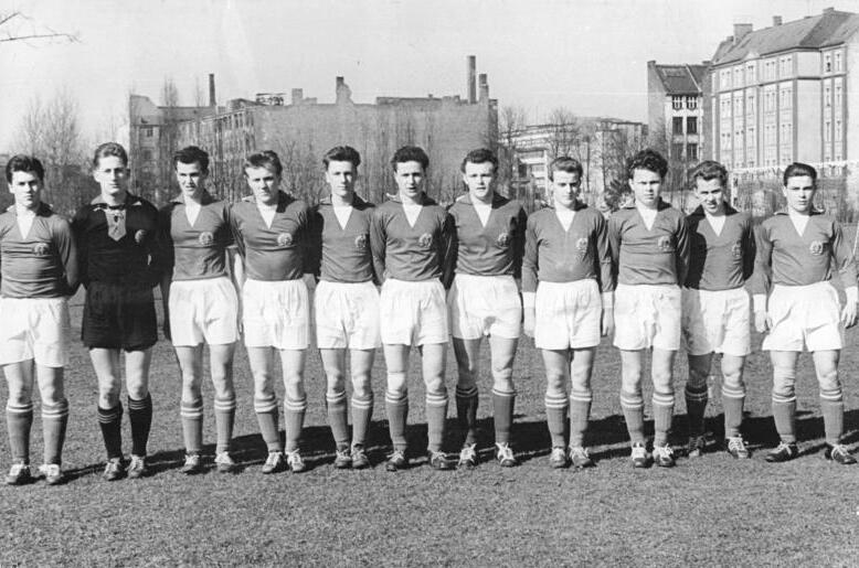 Zentralbild-Wendorf Bey-Noa 14.3.1957 DDR-Jugendauswahl zum FIFA-Turnier. Die DDR-Jugendauswahl im Fußball bereitet sich in diesen Wochen auf das FIFA-Turnier in Spanien vor. Die DDR-Auswahl bestreitet einige Trainingsspiele, um die mannschaftliche Geschlossenheit zu verstärken. Am Sonntag, den 10.3.1957, war im Berliner Walter-Ulbricht-Stadion eine Jugendkombination Vorwärts-Dynamo Berlin der Gegner. Die DDR-Vertretung blieb hier mit 6:1 siegreich. UBz. Die DDR-Jugendvertretung, wie sie in Spanien spielen soll: Wir erkennen von links nach rechts: Wehner, Dalski, Mark, Schwandke, Drews, Urler, Seiler, Klingbiel, Siegel, Strohmeyer und Gase.